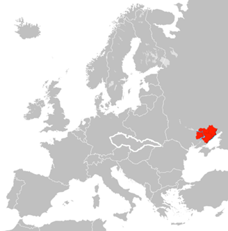 Rozsah Slobodného územia na vtedajšej mape Európy